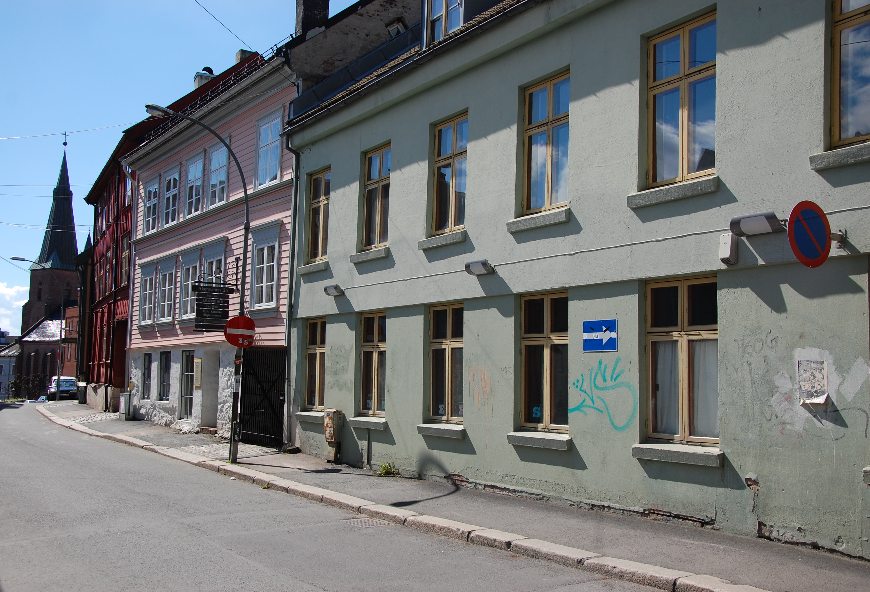 Akersveien, Oslo, sett mot St. Olav domkirke. I bildet Akersveien 25 og Akersveien 27, det grønne huset nærmest er nummer 27, det rosa ved siden av er 25.